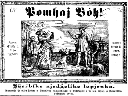 Обложка первого издания Pomhaj Bóh 1891 года